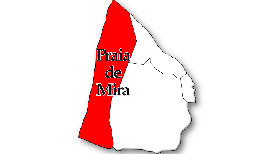 População